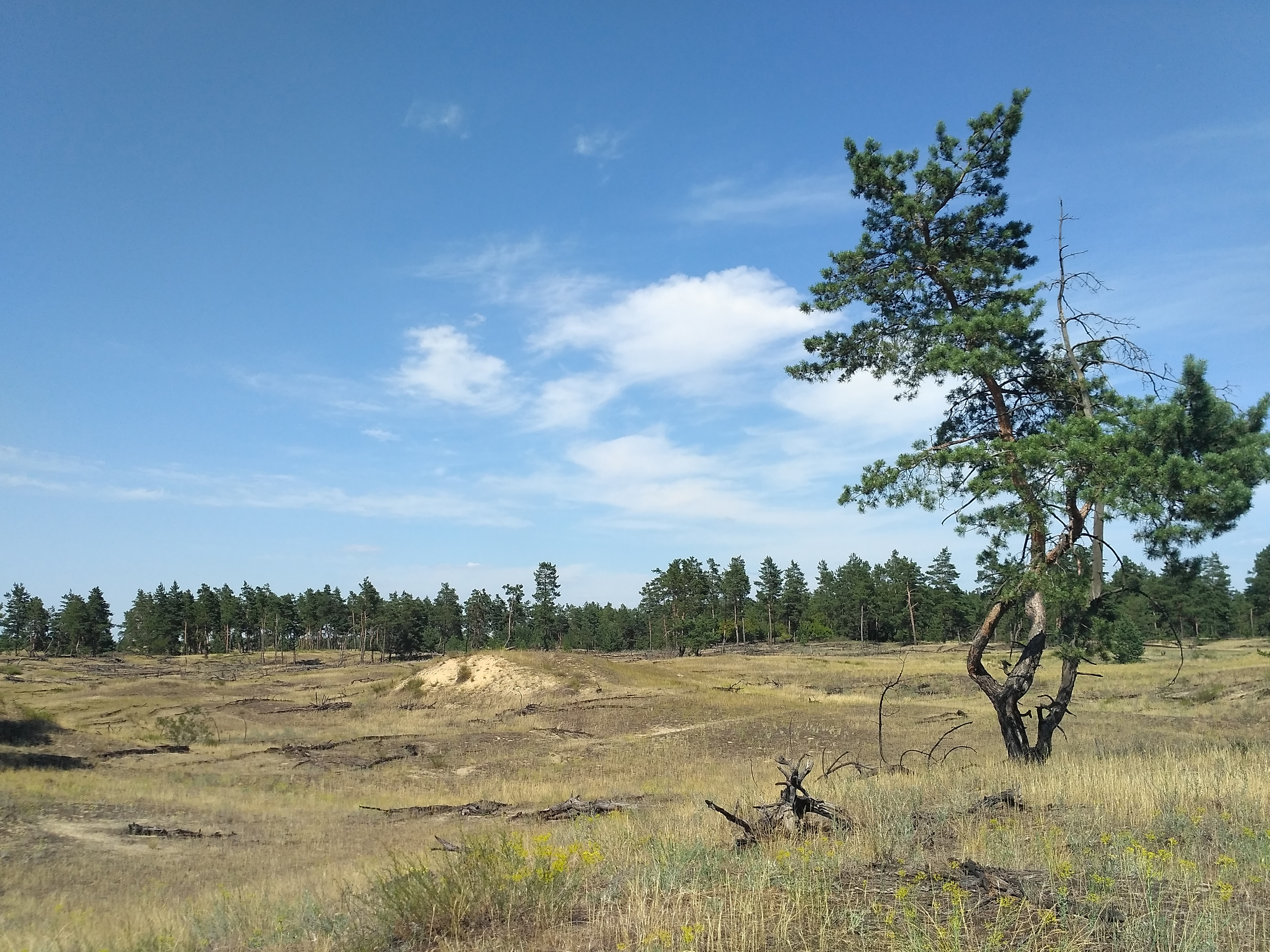 Дніпровсько-Орільський, Дніпропетровський та Петриківський райони, Орільське лісництво